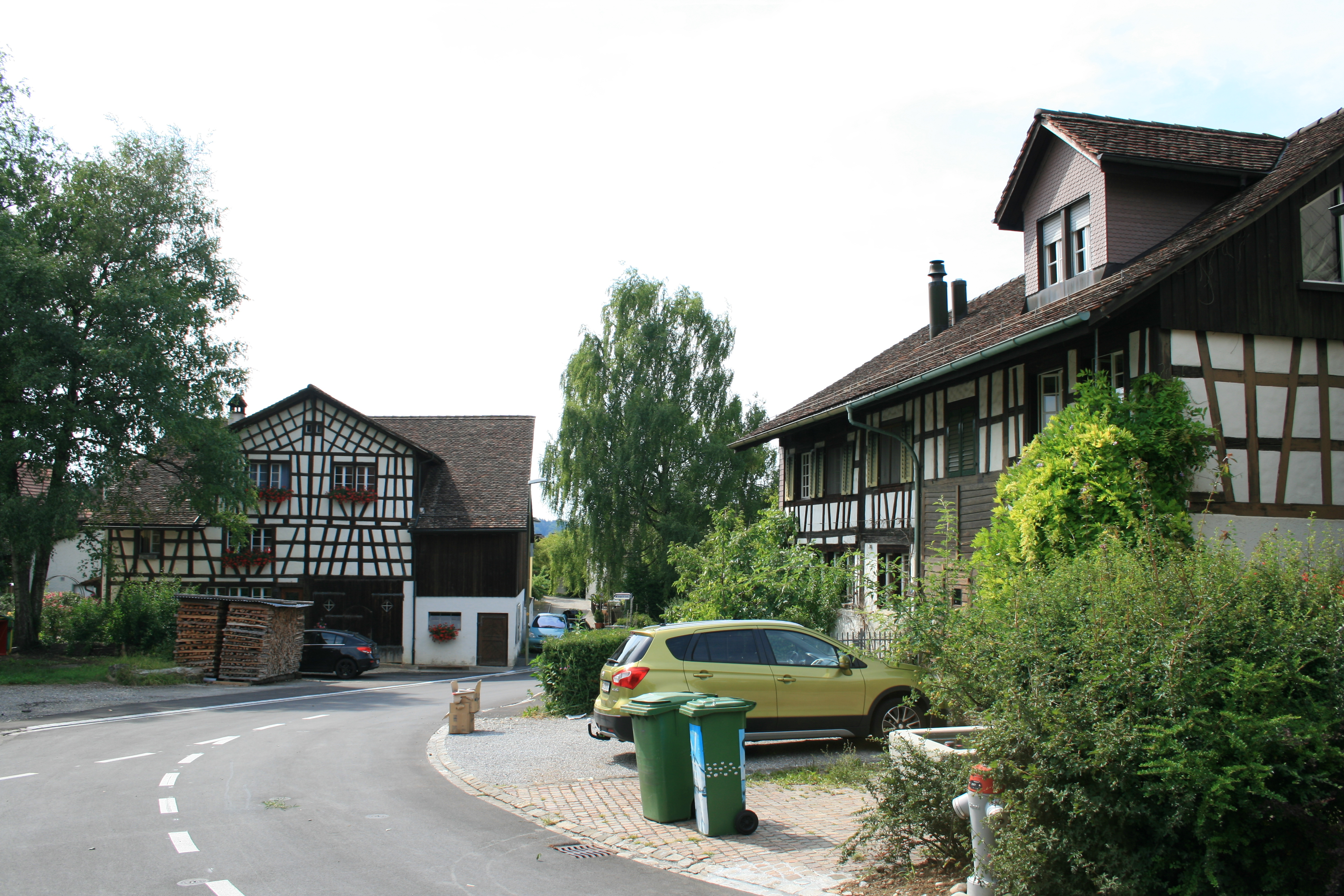 Die denkmalgeschützten Fachwerkhäuser Oberseenerstrasse 111-113 (rechts) und 114 (hinten) im ehemaligen Ortszentrum Oberseens